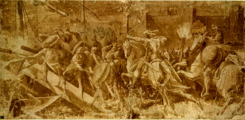 Battaglia notturna sul Po